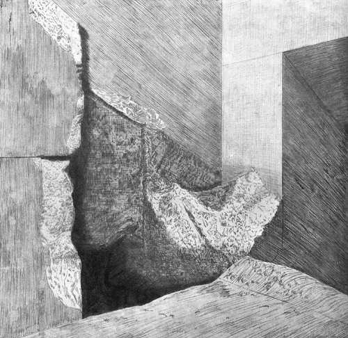 embranchement de la grande galerie dans la pyramide de Khéops